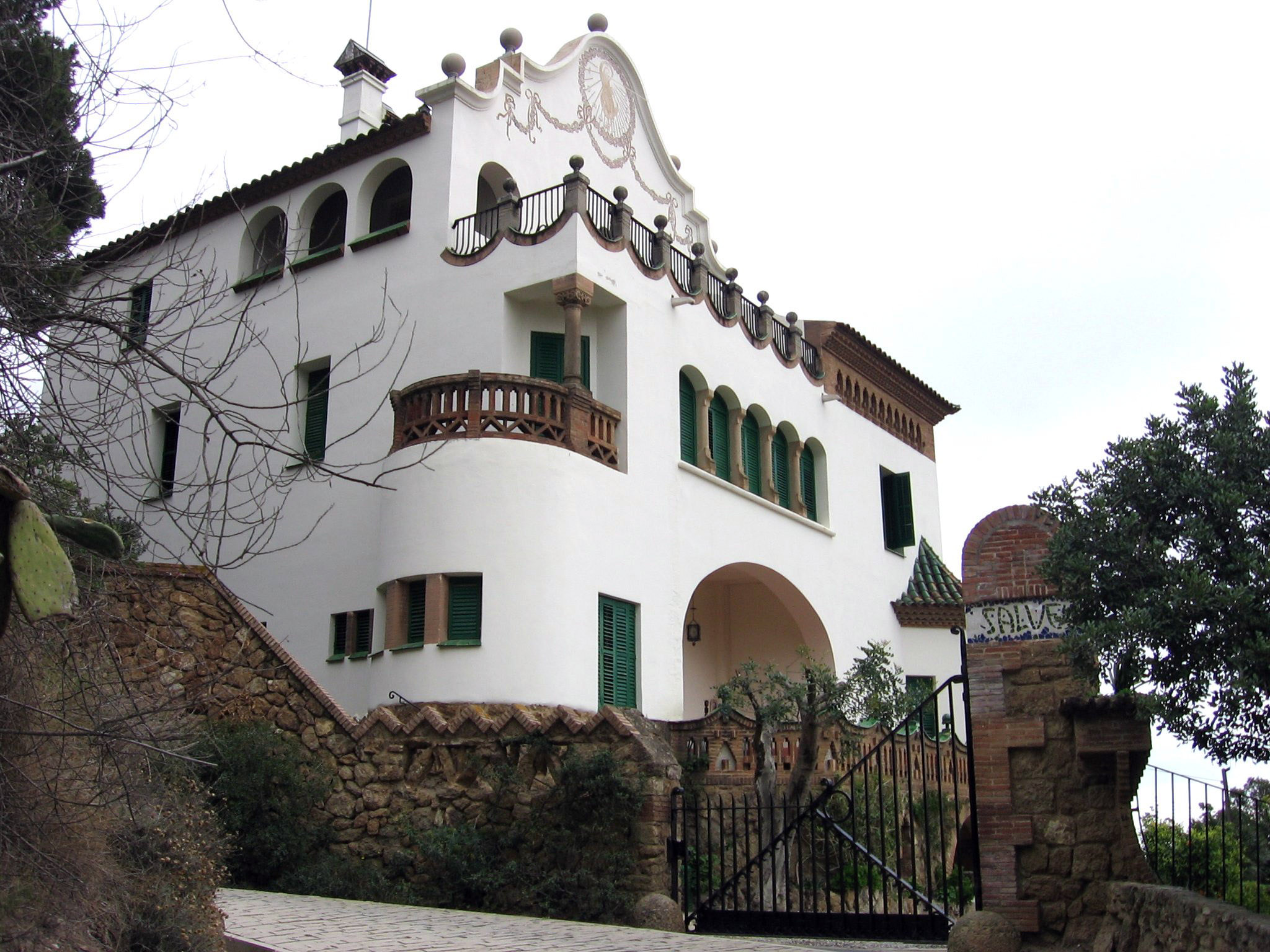 Casa Trias, de Juli Batllevell